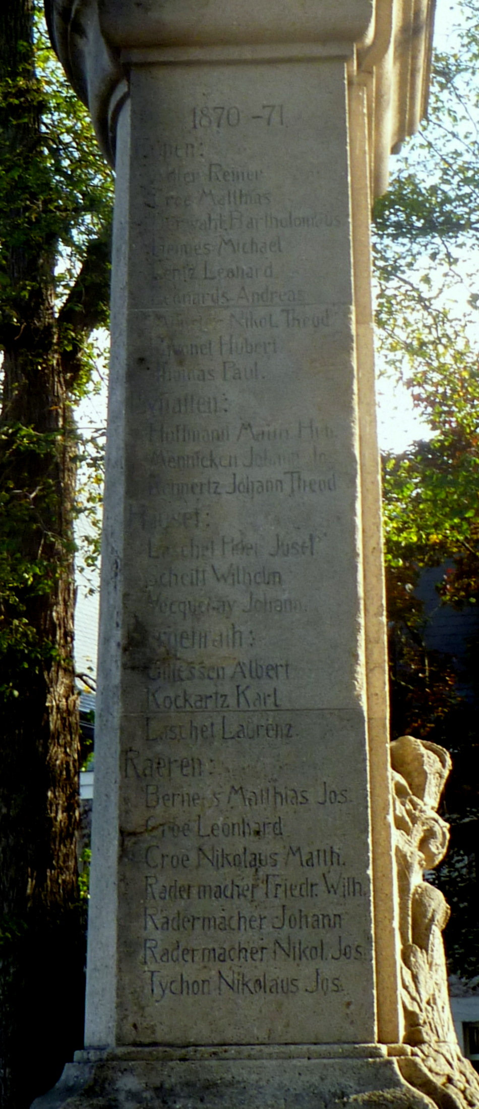 Kriegerdenkmal Eupen, Inschriften an der Westseite